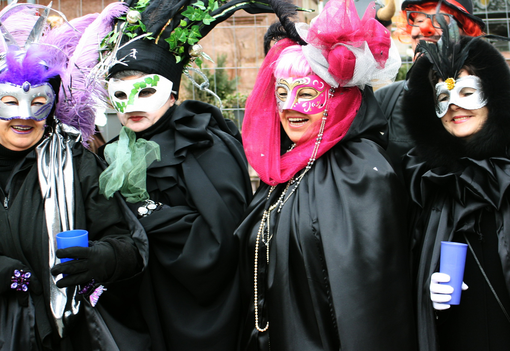 Kostümierte Frauen am Marienplatz (München).